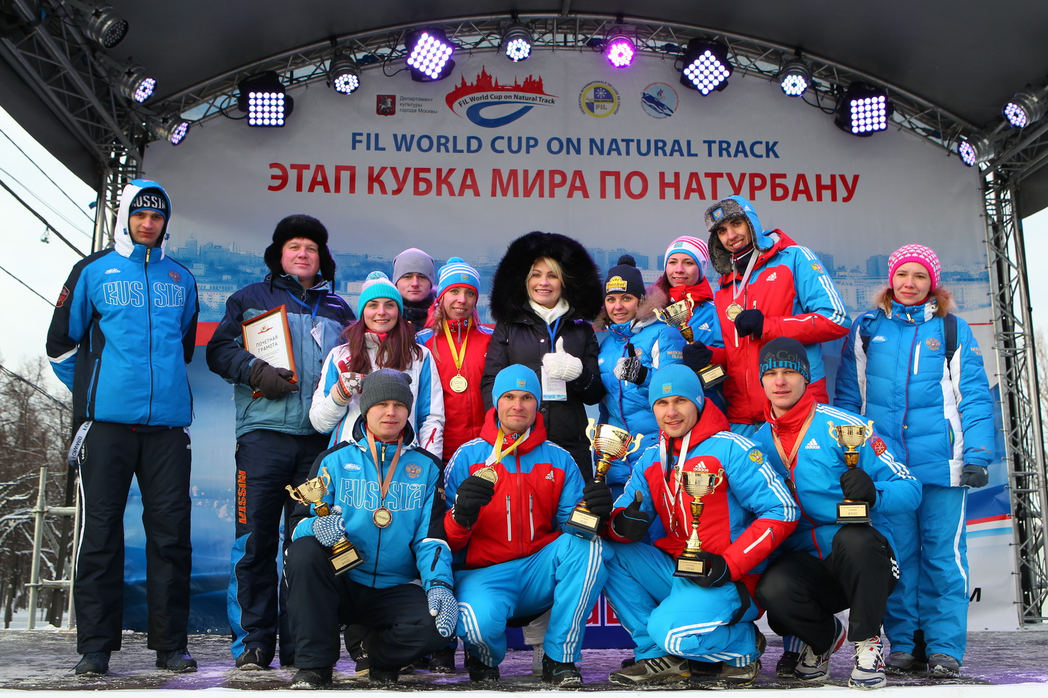 Сборная команда России по натурбану